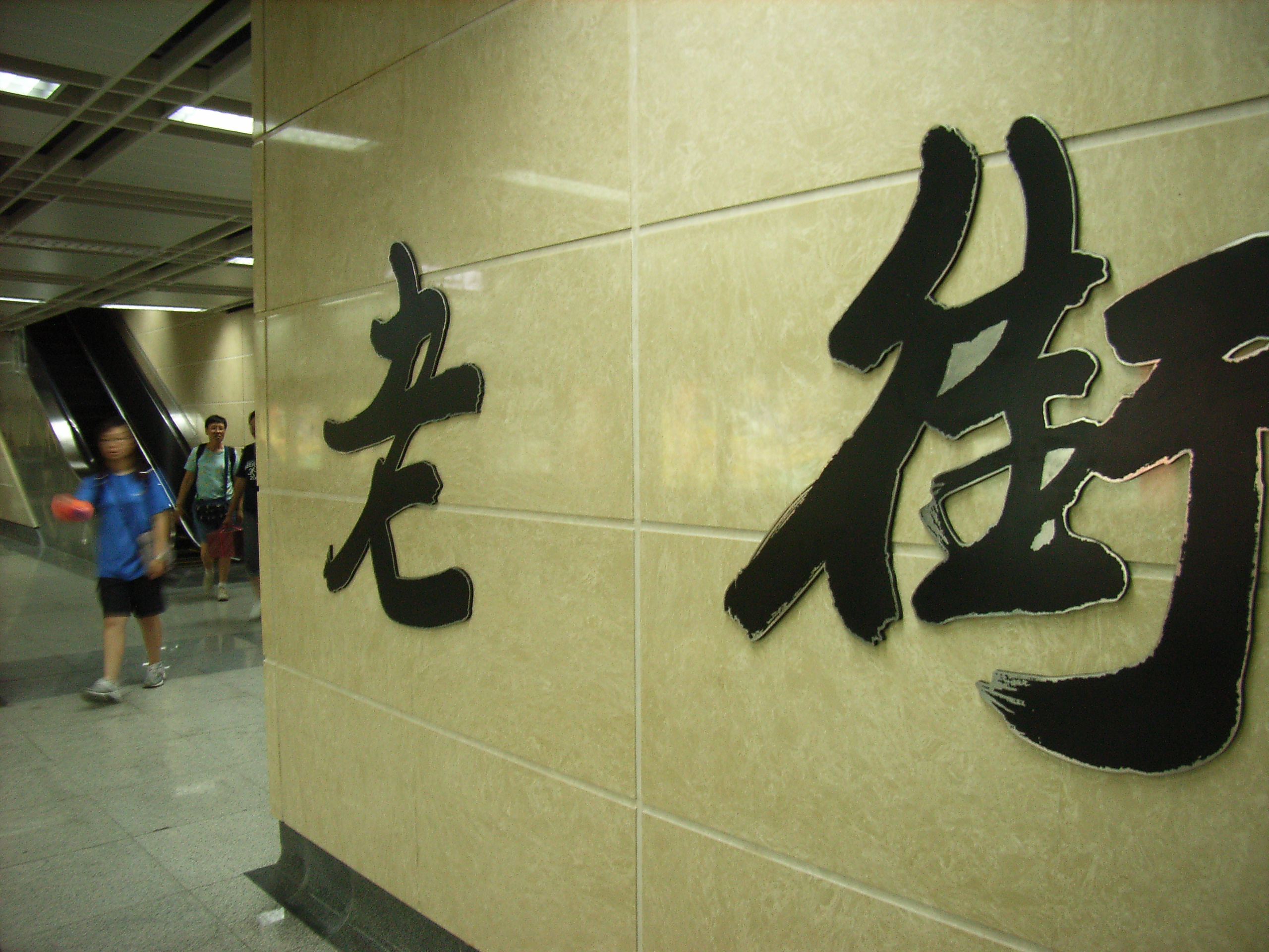 老 街 (lǎo jiē) "old road" 毛筆字大號寫成的深圳地鐵站中文名 --- 廣東省深圳市老街站 By MEIGU88